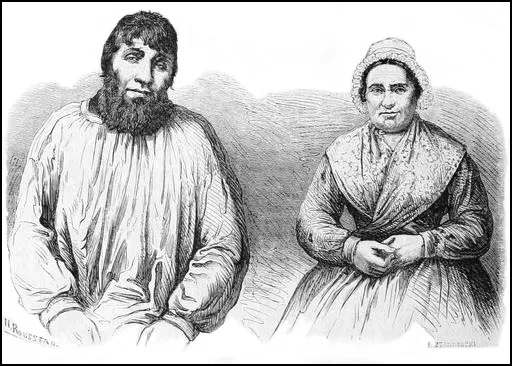 Grabado de los esposos Dumollard que ilustra la crónica de su caso en "Causes célèbres de tous les peuples" Escrito por Armand Fouquier, Publicado por H. Lebrun, novena edición. 1864. Tomo VII.